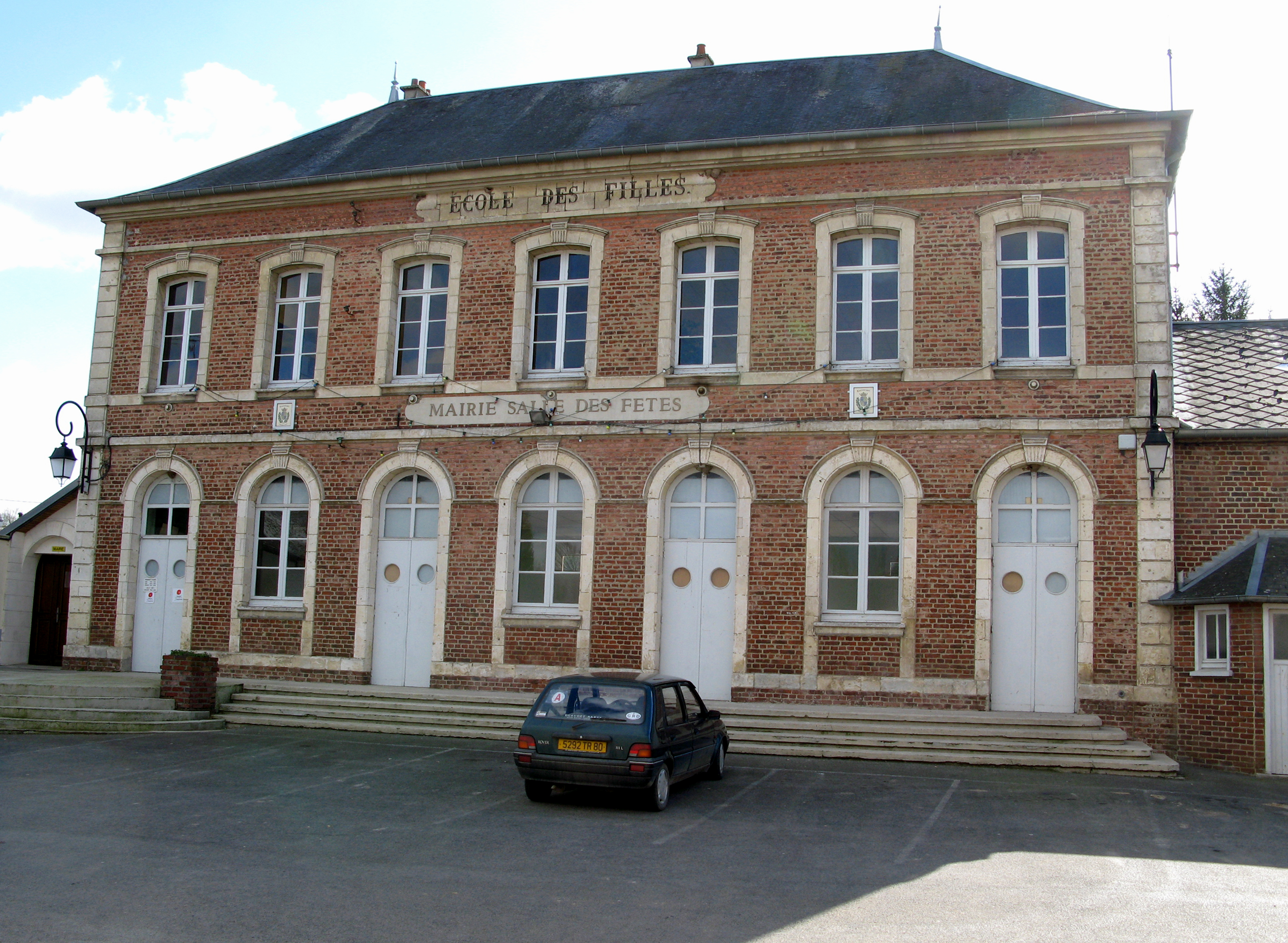 Toutencourt (Somme, France) - La Mairie.